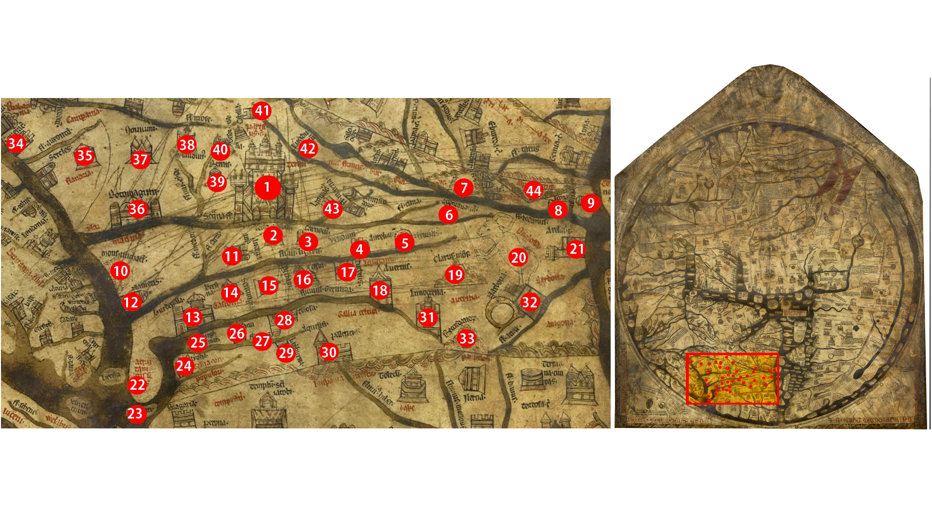 Carte du monde de Hereford, Hereford Cathedral, Angleterre. Centré sur la France.